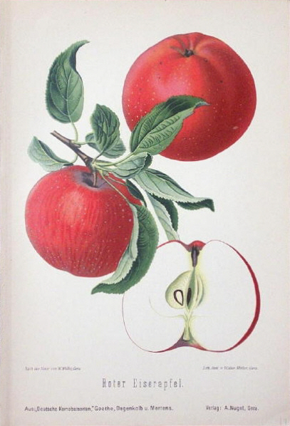 Roter Eiserapfel by Rudolf Goethe, Aepfel und Birnen, 1894.